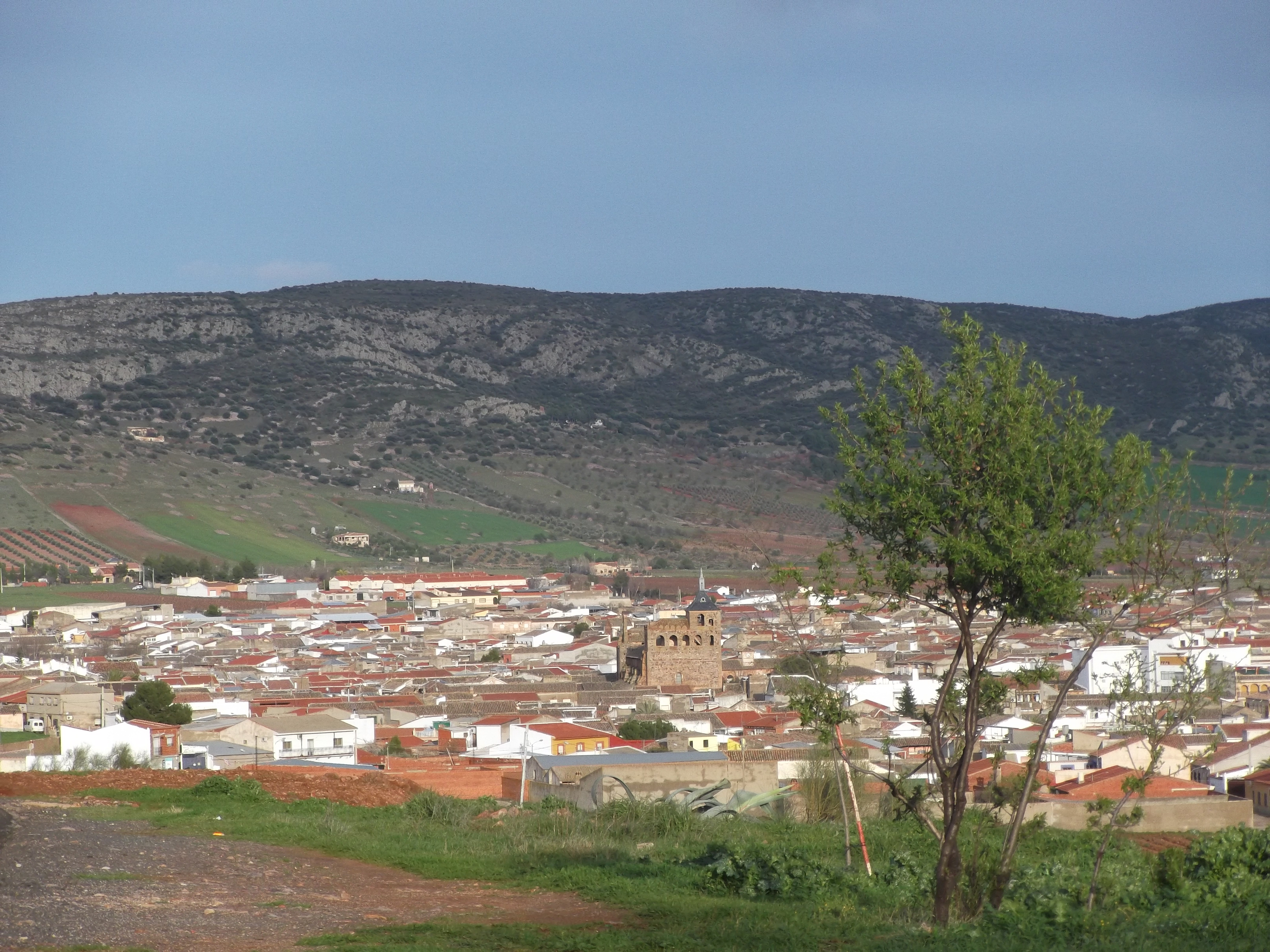 Panorámica del municipio de Moral de Calatrava (Ciudad Real) desde la carretera de Bolaños de Calatrava. Ciudad de Moral de Calatrava